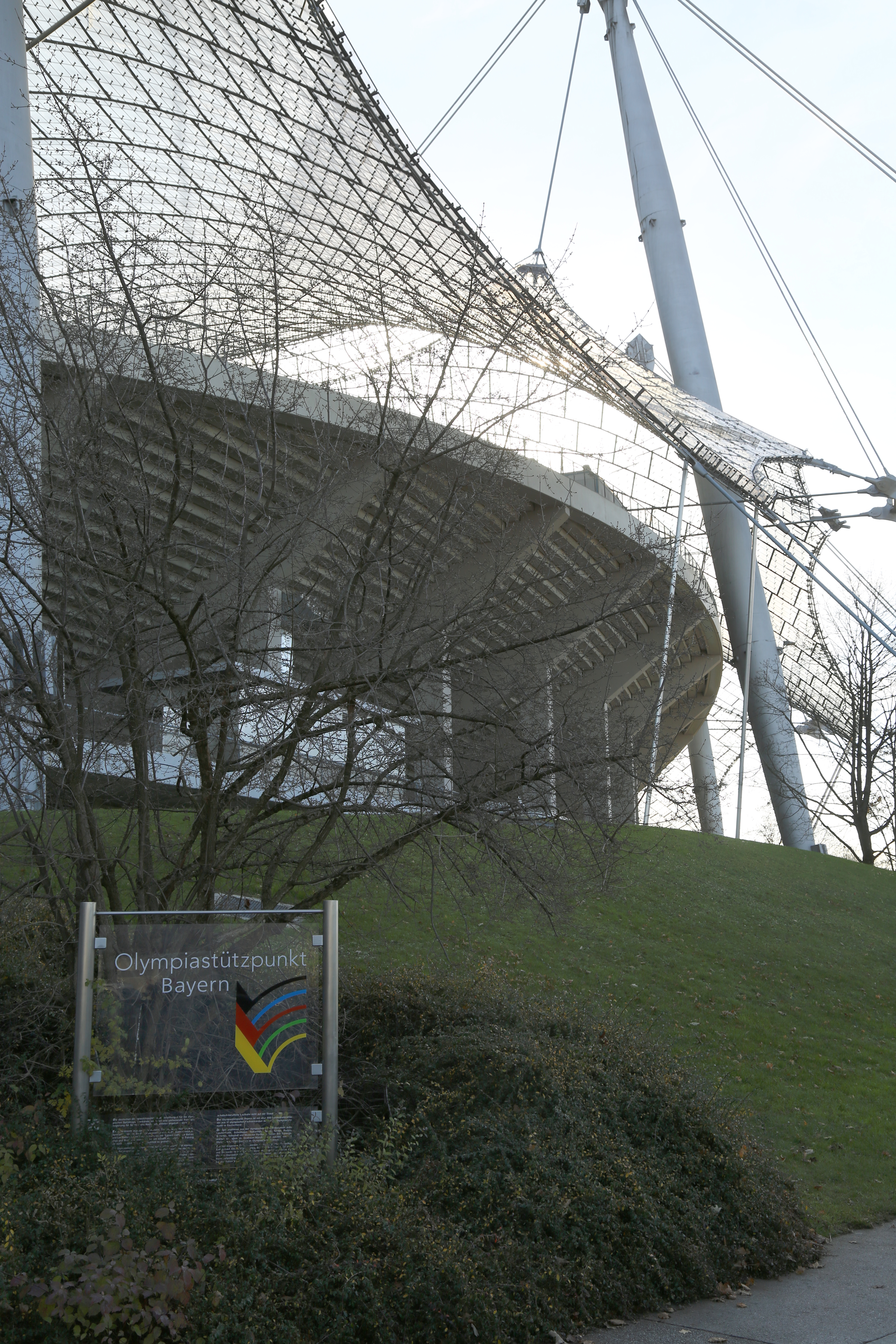 Olympiastützpunkt Bayern im Münchner Olympiastadion.